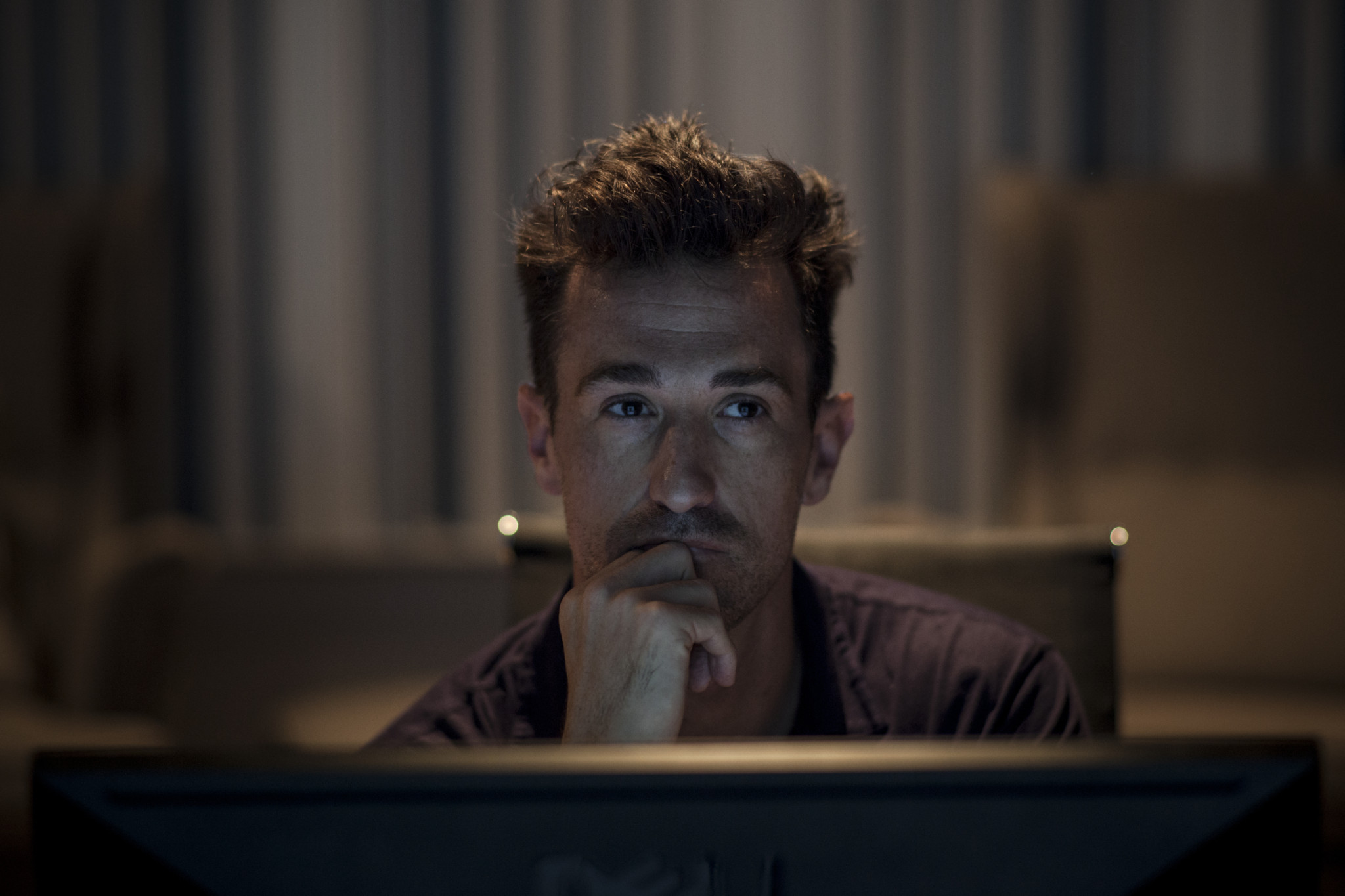 Oriol Tarragó / Diseñador de sonido